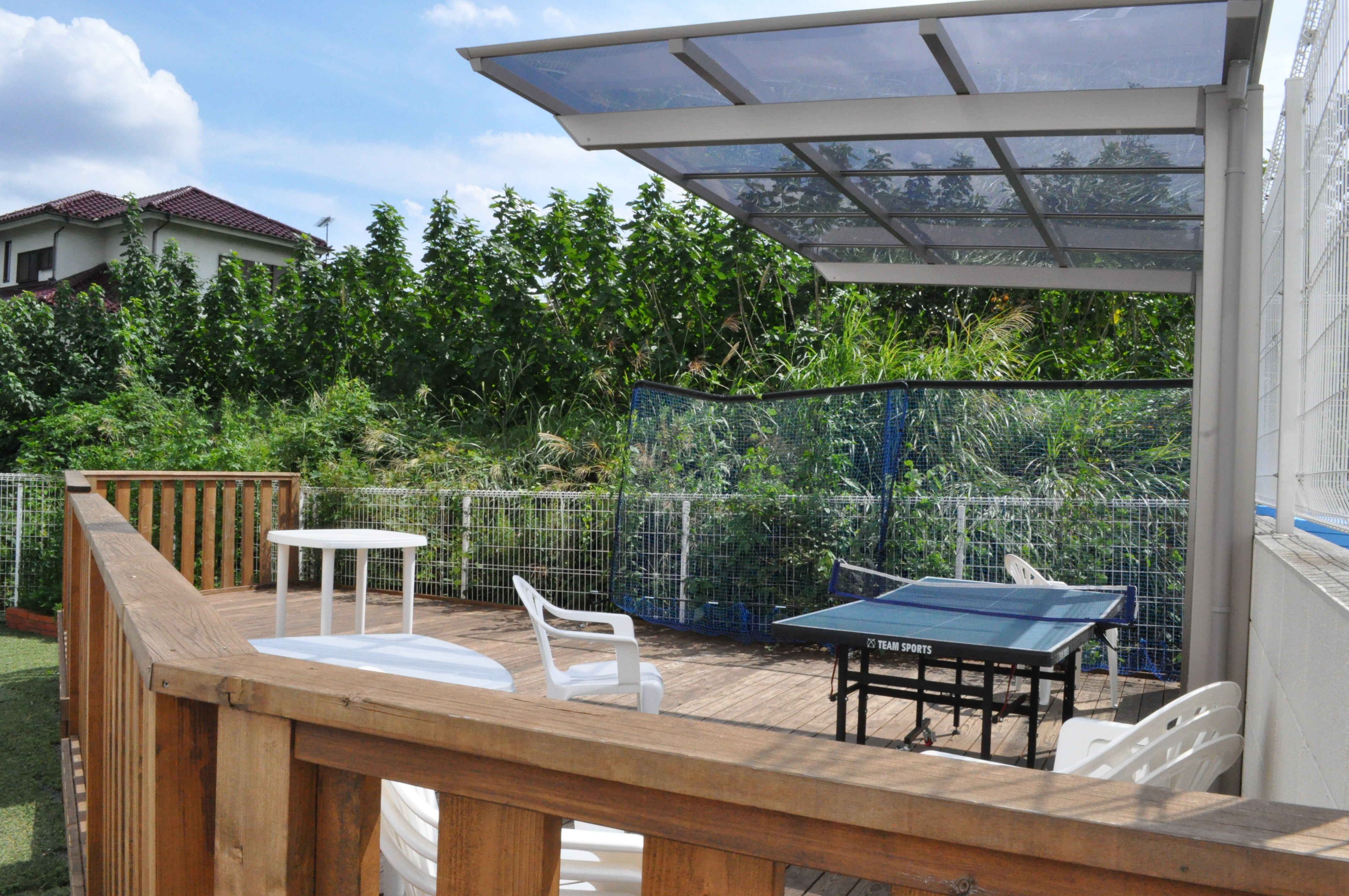 plateforme de tennis de table de TWIS